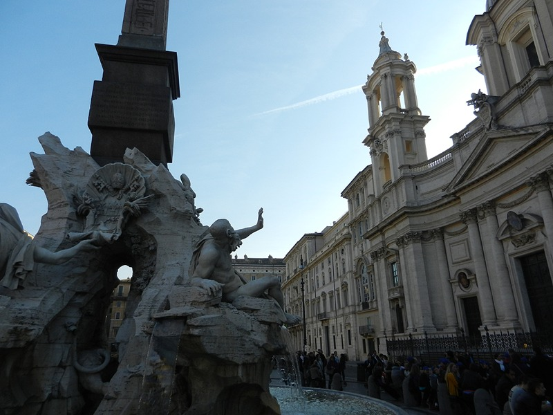 Roma - Fontana dei Fiumi in Piazza Navona